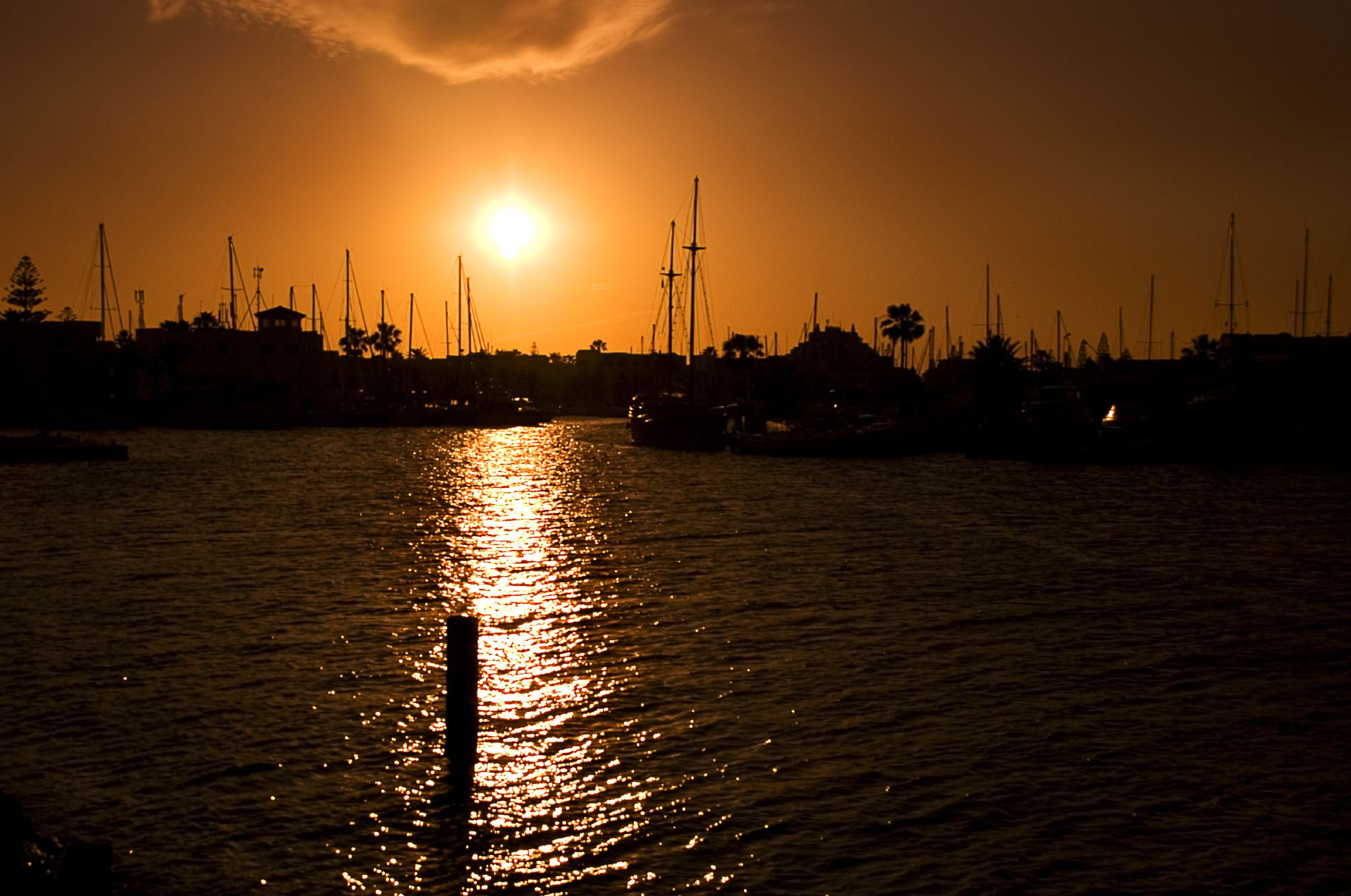 Port El Kantaoui, Sousse, Tunisia.